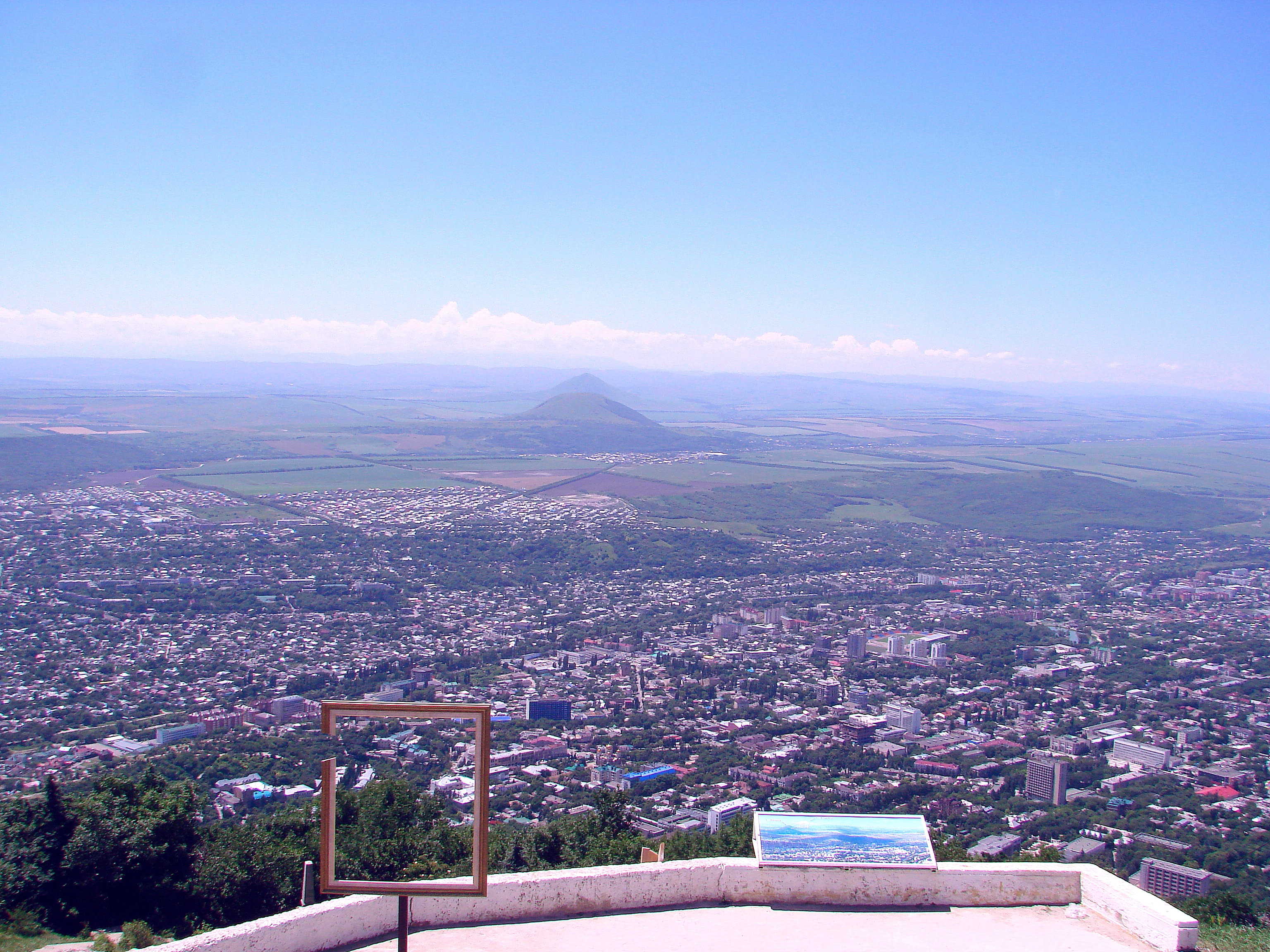 вид на Пятигорск